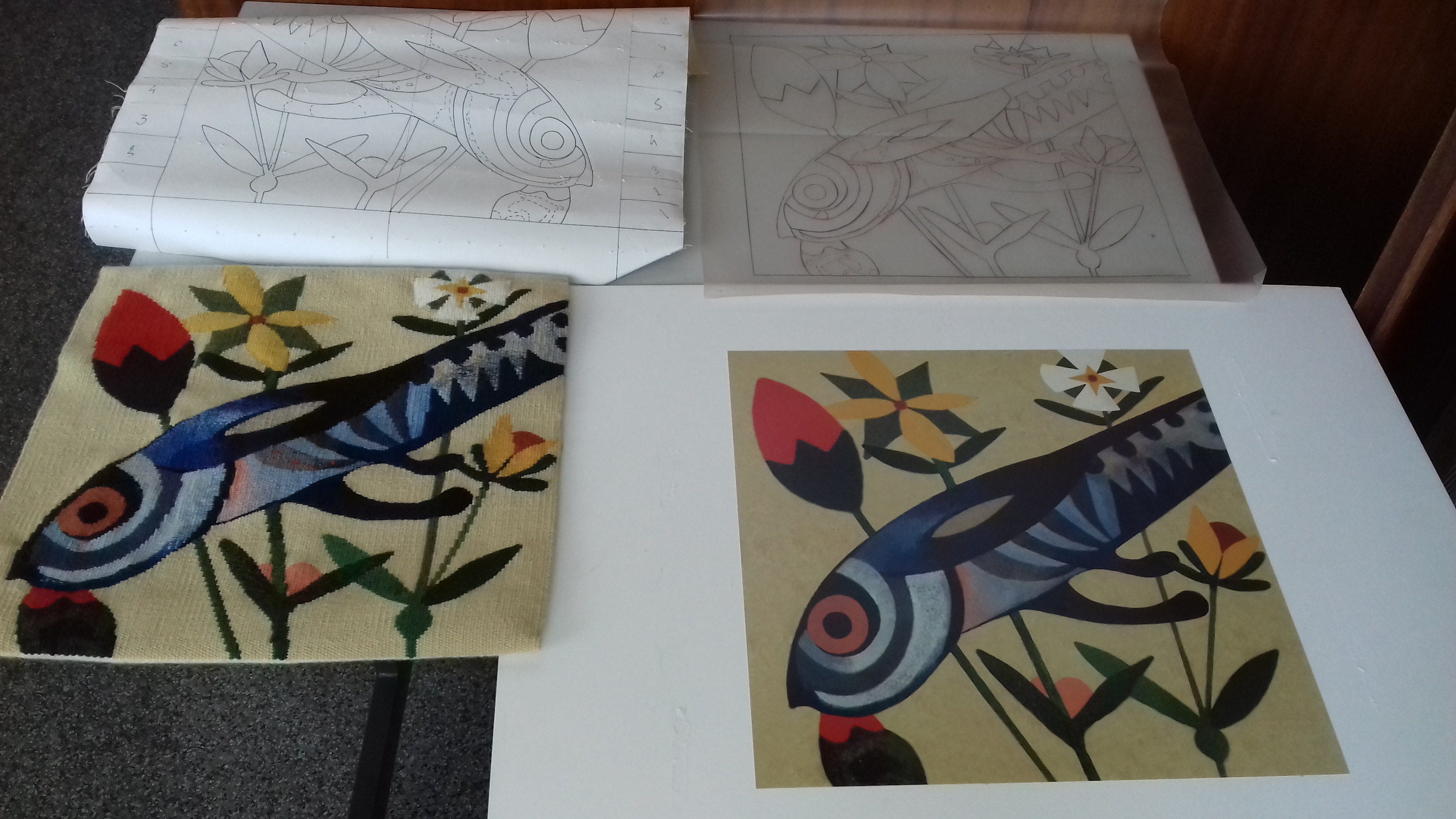 Le lissier réalise un calque d'après modèle, à partir duquel il dessine un transfert qui comporte les lignes des motifs, les passages de couleur, les annotations techniques. Ensuite, il peut passer au tissage de la tapisserie. This media was taken during the workshop of the 21 September 2018 at the Mobilier national, supported by Wikimédia France. English | français | +/−